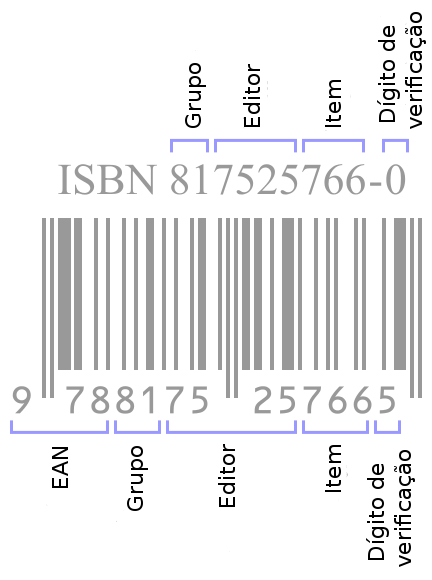 Pormenor dos componentes de um ISBN.